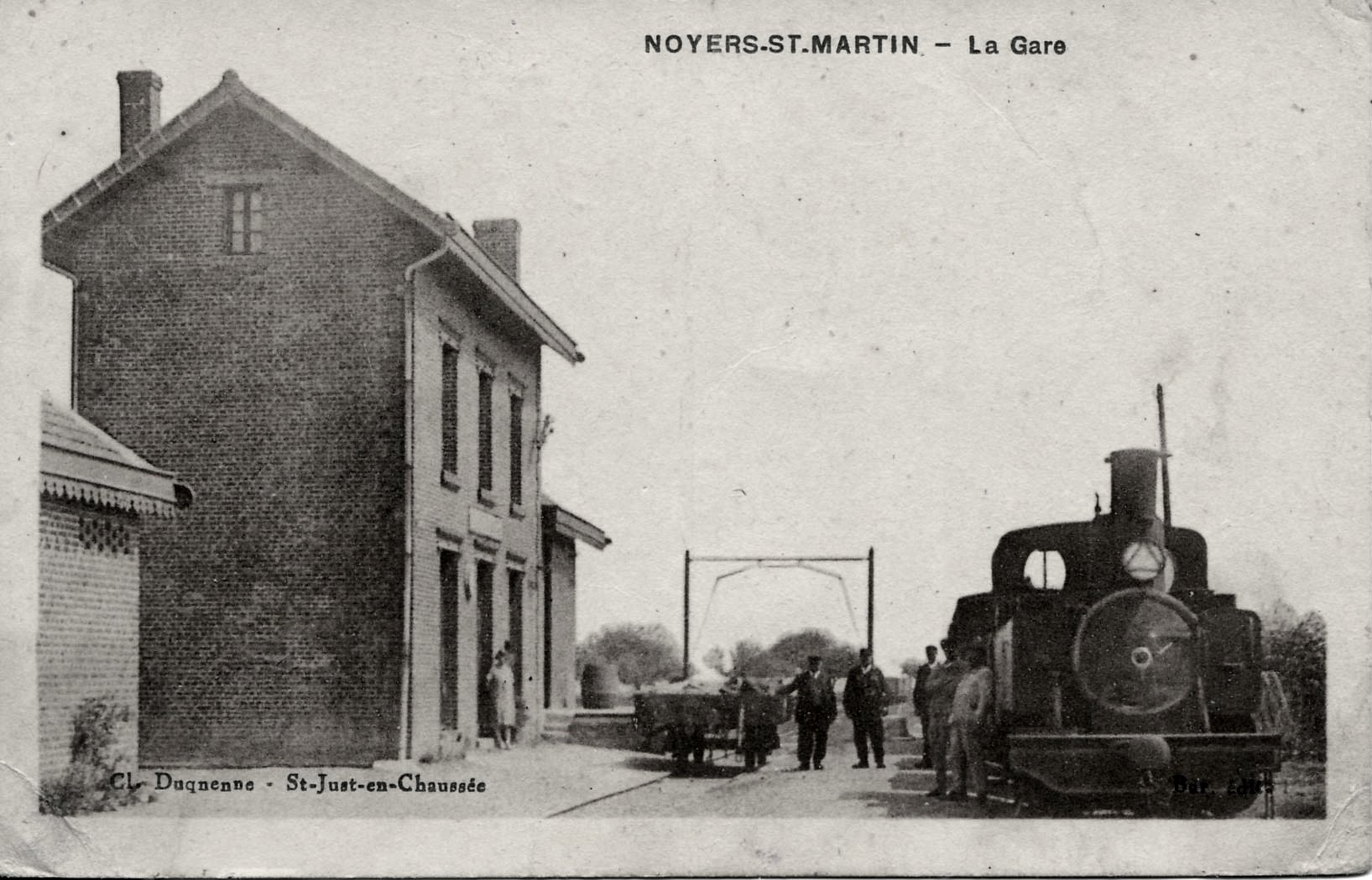 Carte postale ancienne éditée par Cl. Duquenne à Saint-Just en Chaussée NOYERS-ST-MARTIN - La Gare Ligne de chemin de fer secondaire Estrées-Saint-Denis - Froissy - Crèvecoeur-le-Grand (Oise - Picardie - France)